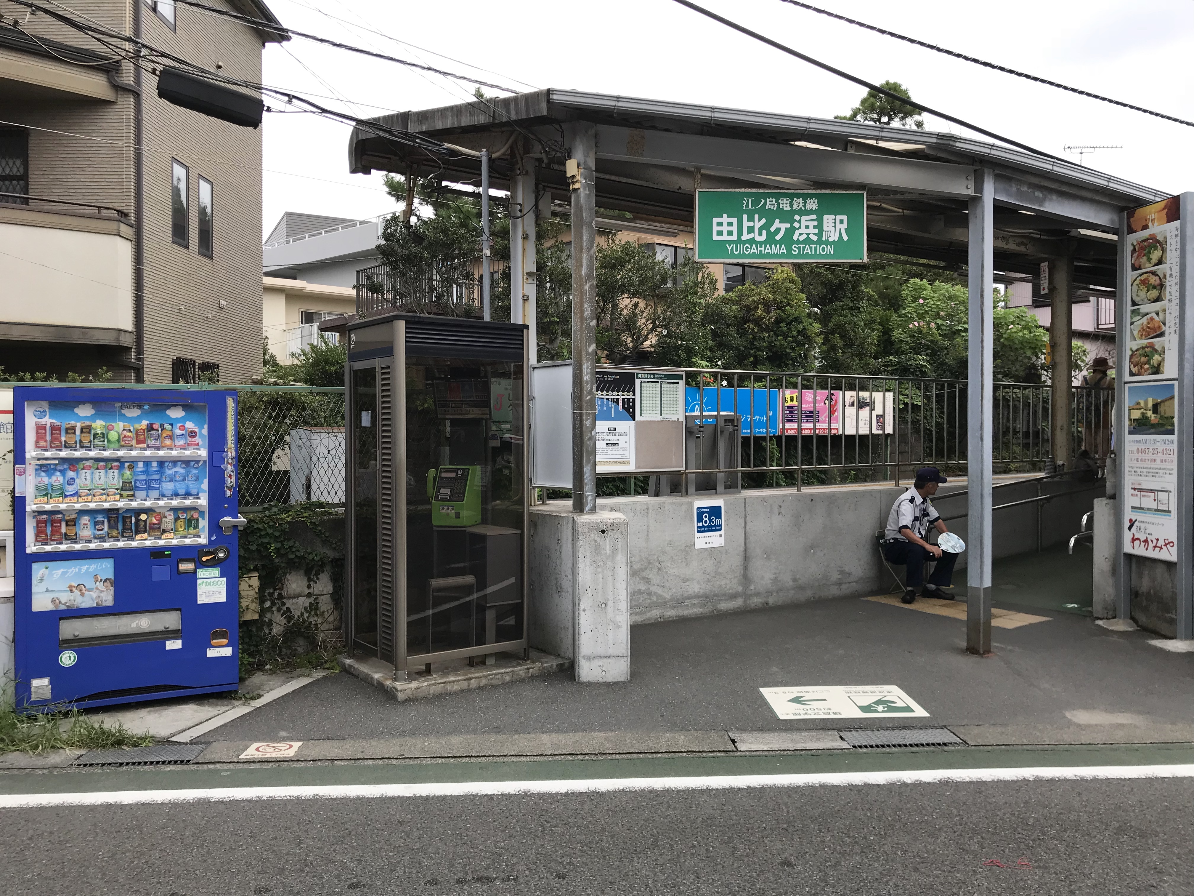 江ノ電由比ヶ浜駅駅舎